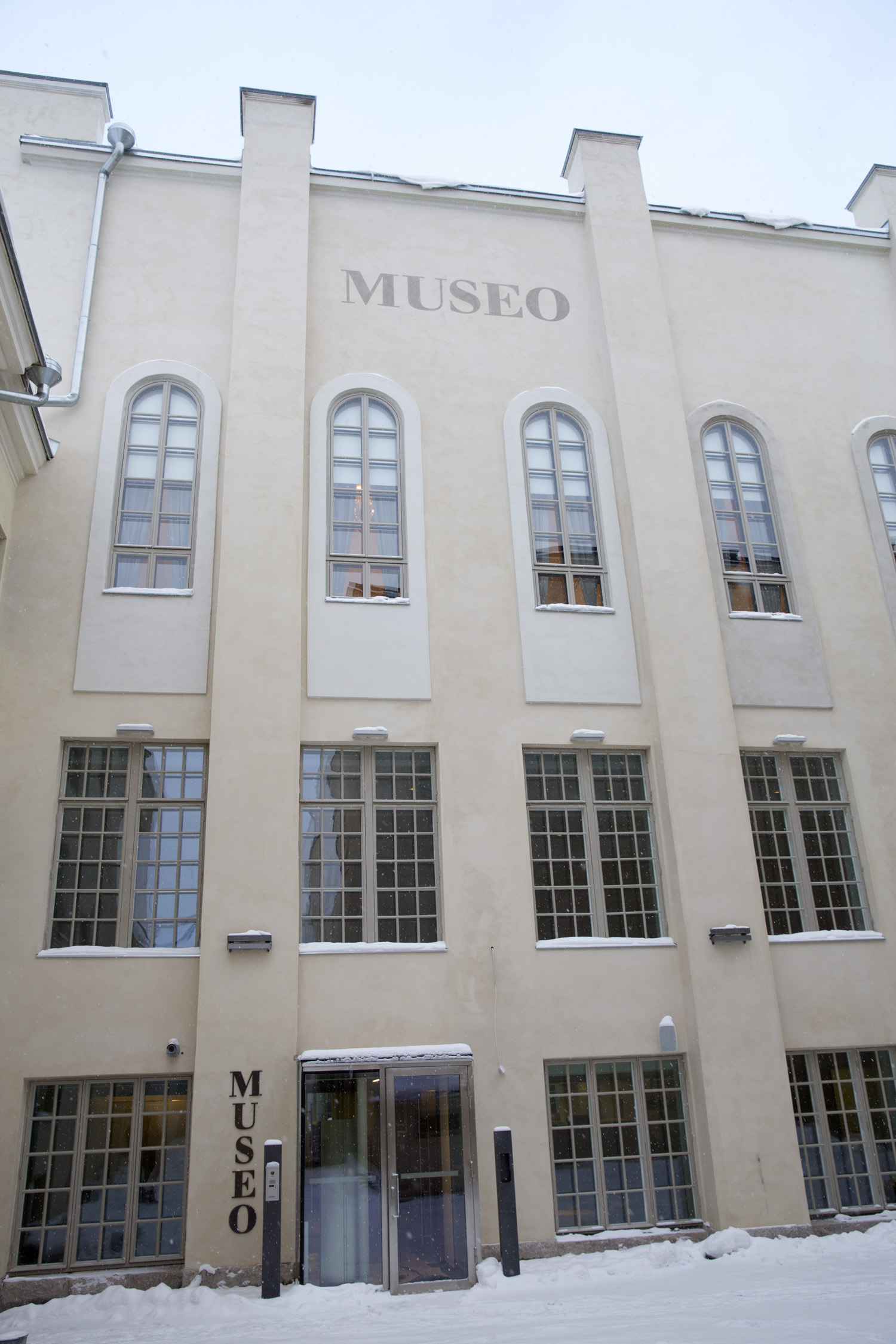 Kaupunginmuseon sisäpiha, Goviniuksen piha.